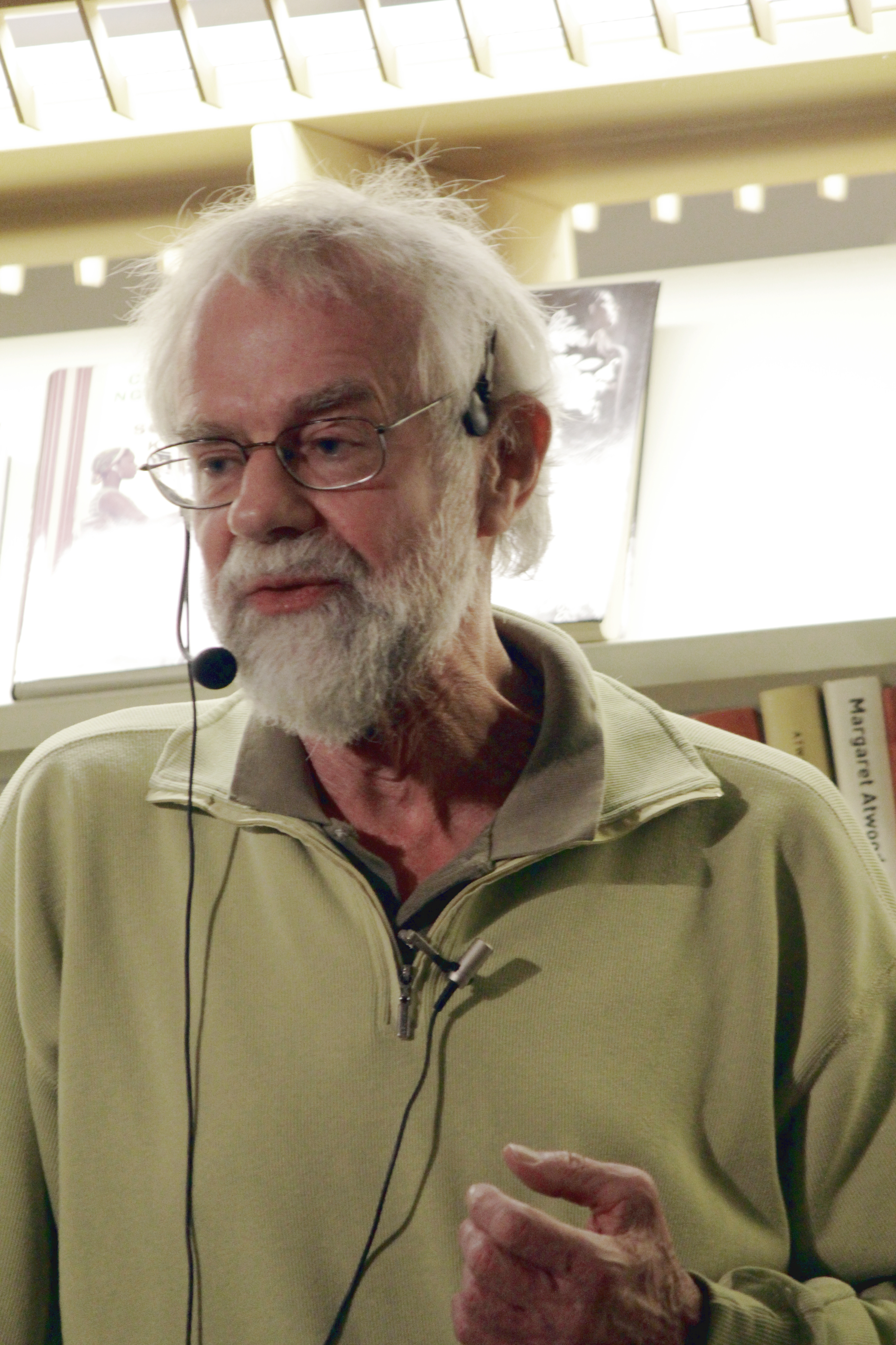 Stig Welinder på Hedemora stadsbibliotek